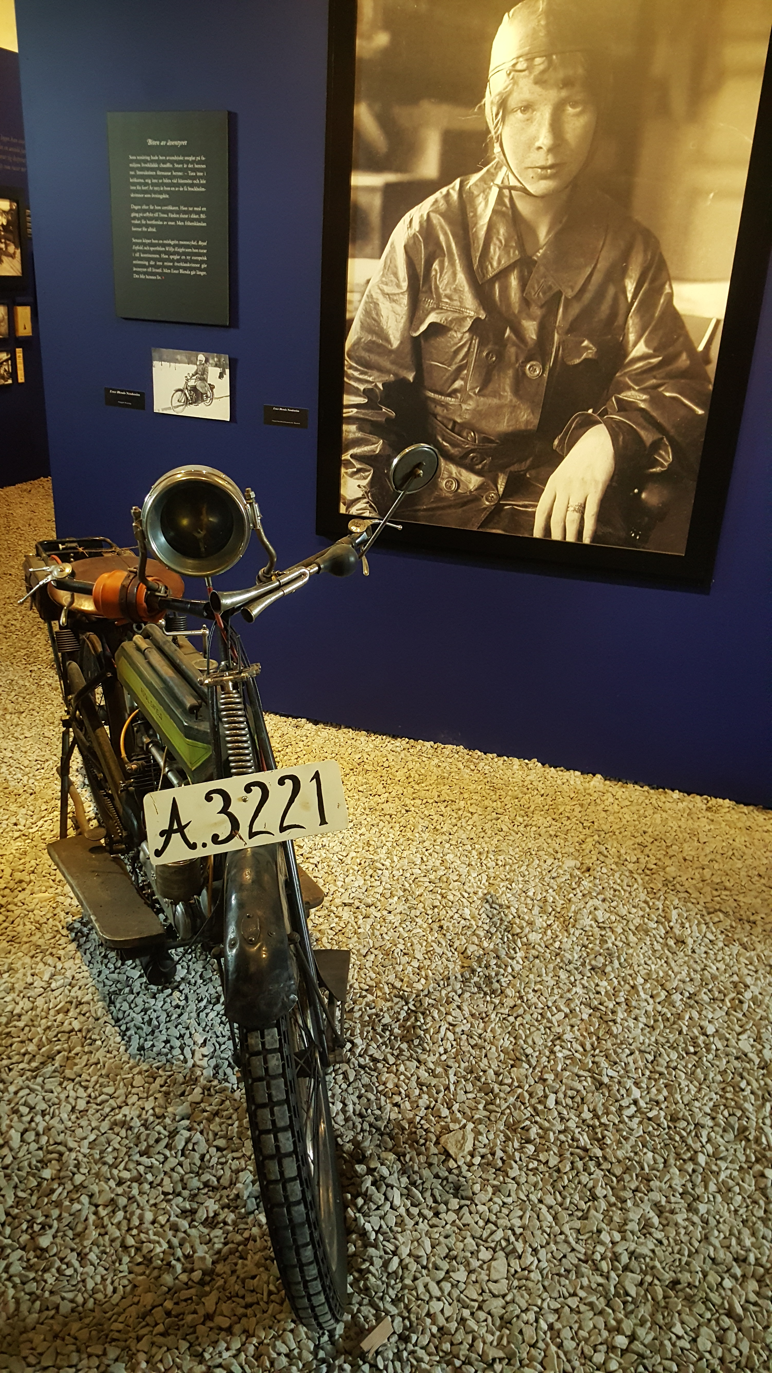 Ester Blenda Nordströms motorcykel, på Skarhult slotts utställning 2019